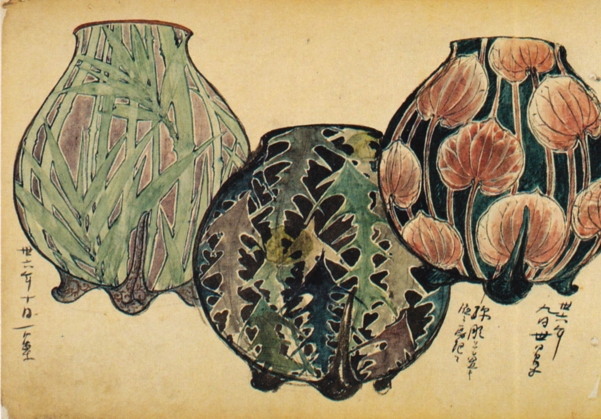 Design Sizzen